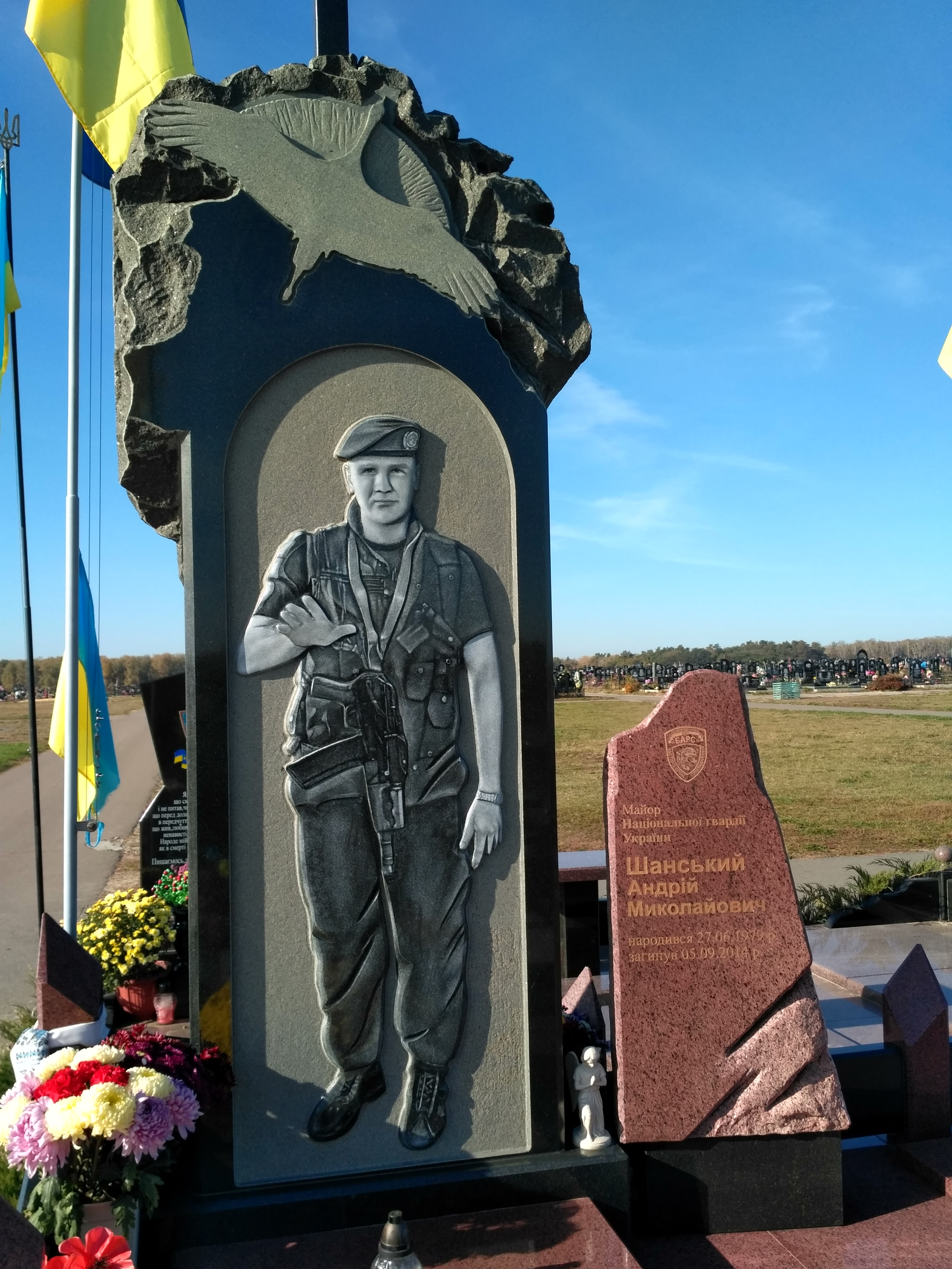 могила